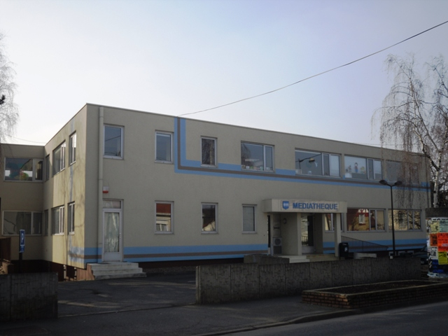 La médiathèque municipale d'Epinay-sur-Orge (91)